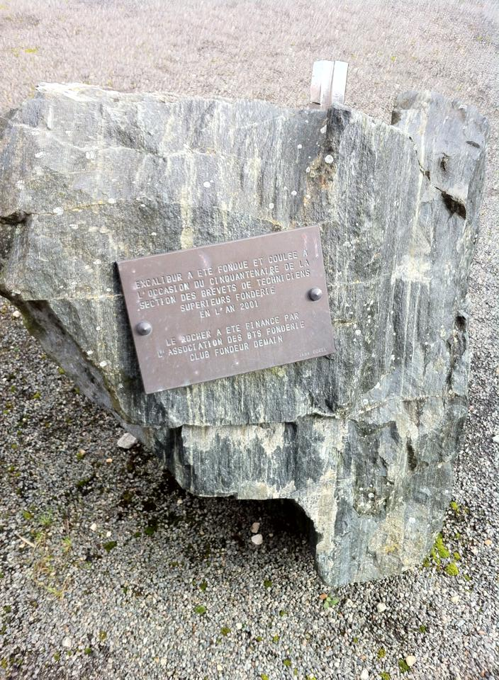 L'épée d'excalibur fondue a l'occasion du cinquantenaire du lycée